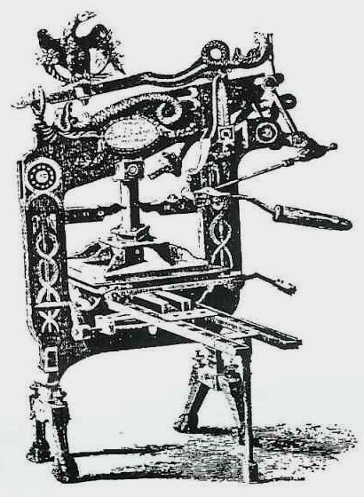 Hebrew printing press belonging to Israel Beck of Barditchev, Safed and Jerusalem. מכונת הדפוס המודרנית הראשונה בירושלים מתנת מונטיפיורי לדפוס הראשון של ב"ק